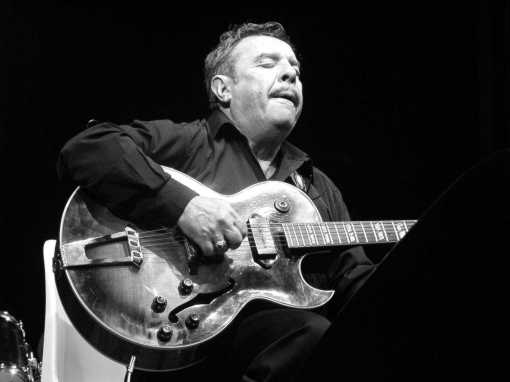 Christian Escoudé (festival de jazz Conilhac Corbières 21eme edition)